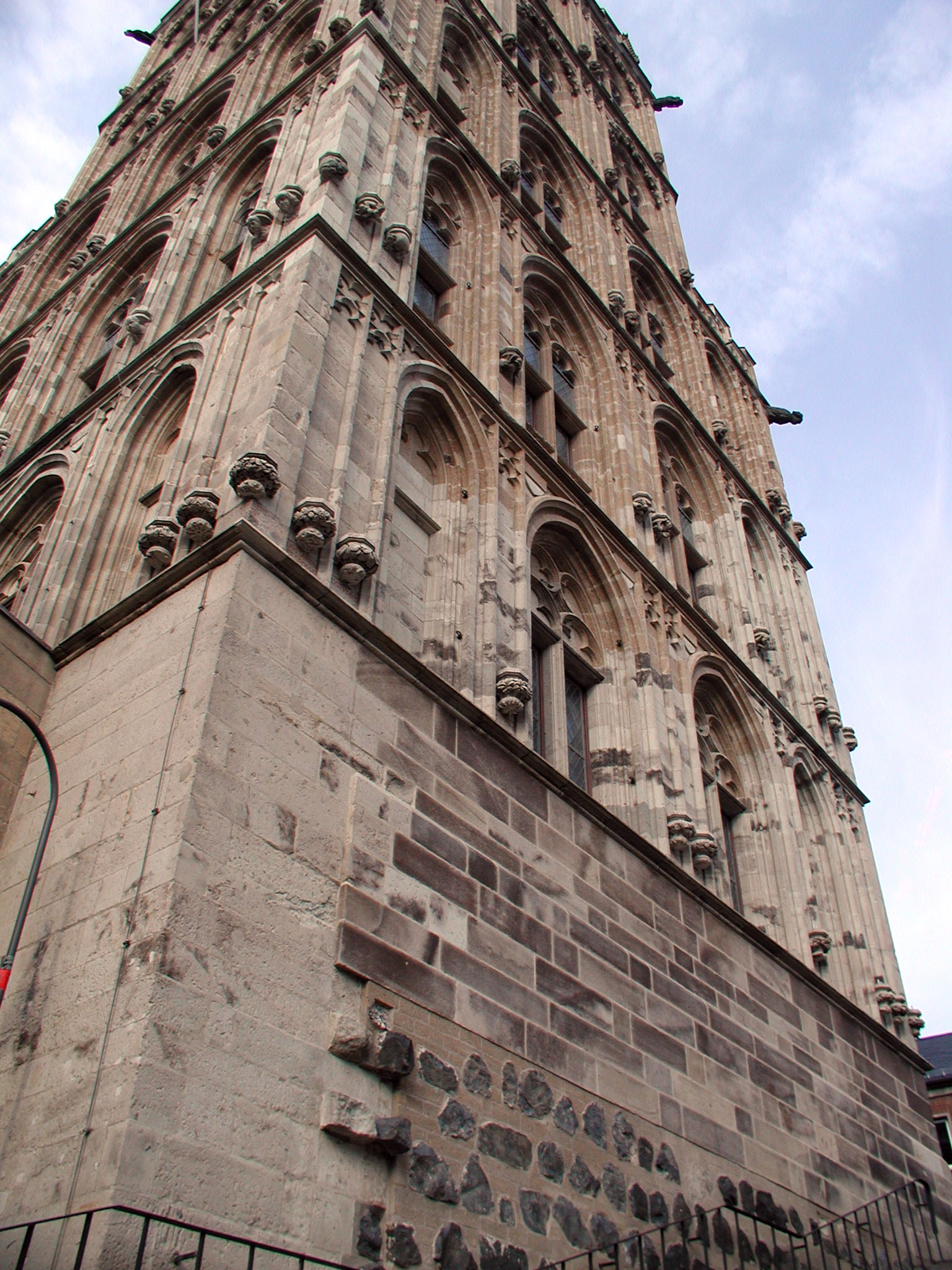 Kökn-Rathausturm, Fundament am Treppenaufgang Alter Markt